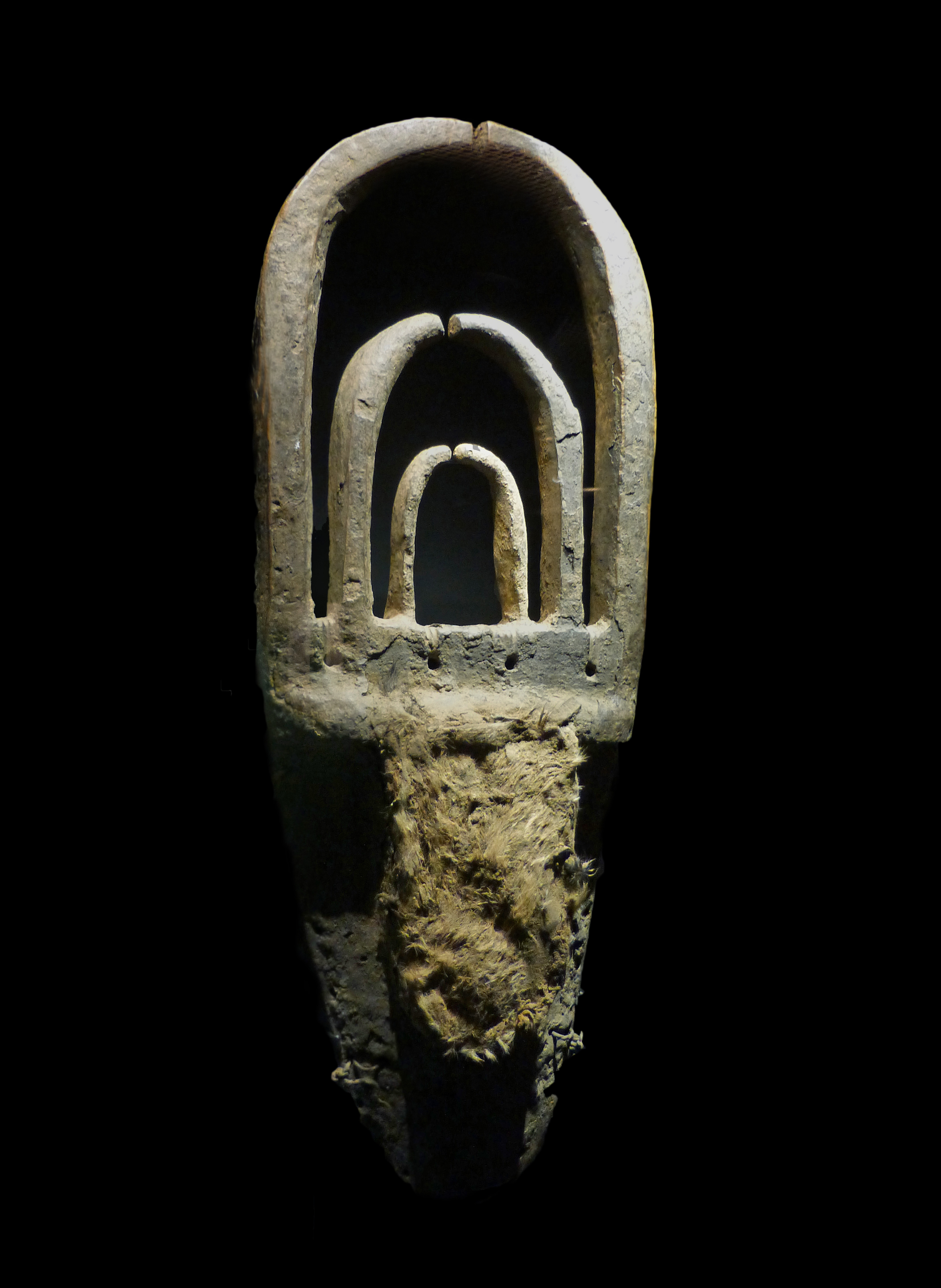 Liberia, masque-autel kouranko. Bois, peau et sang animal, métal, griffes, graines. Masque de l'initiation du Poro. Musée du quai Branly. N° d'inventaire : 73.1965.5.10 [1]